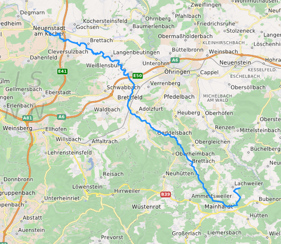 carte réalisée sur umap This map may be incomplete, and may contain errors. Don't rely solely on it for navigation.